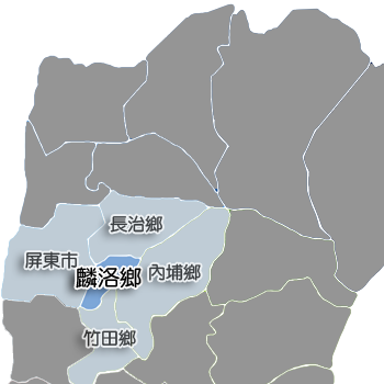 屏東縣麟洛鄉相對位置。